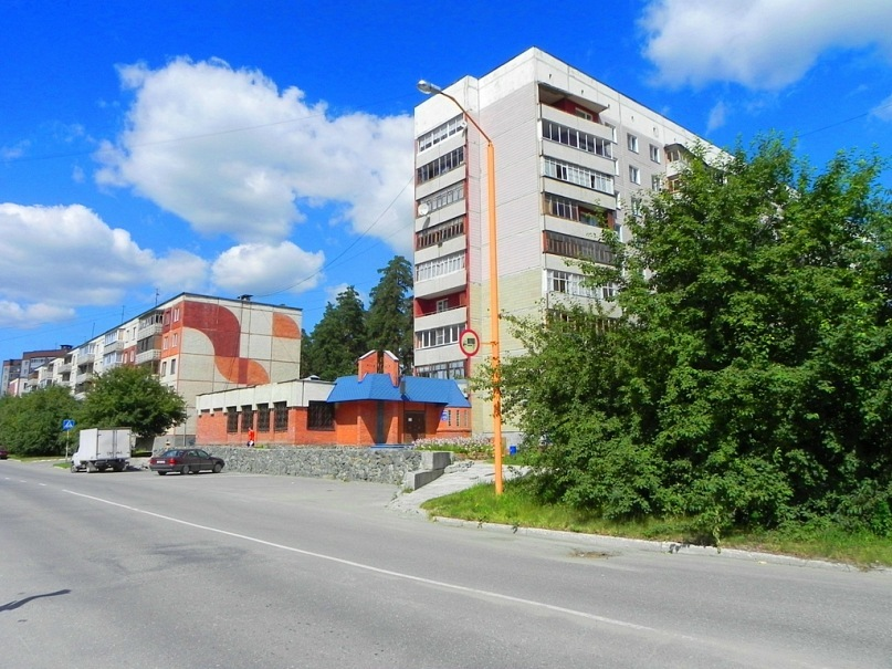 Кафе "Флагман" на улице Курчатова